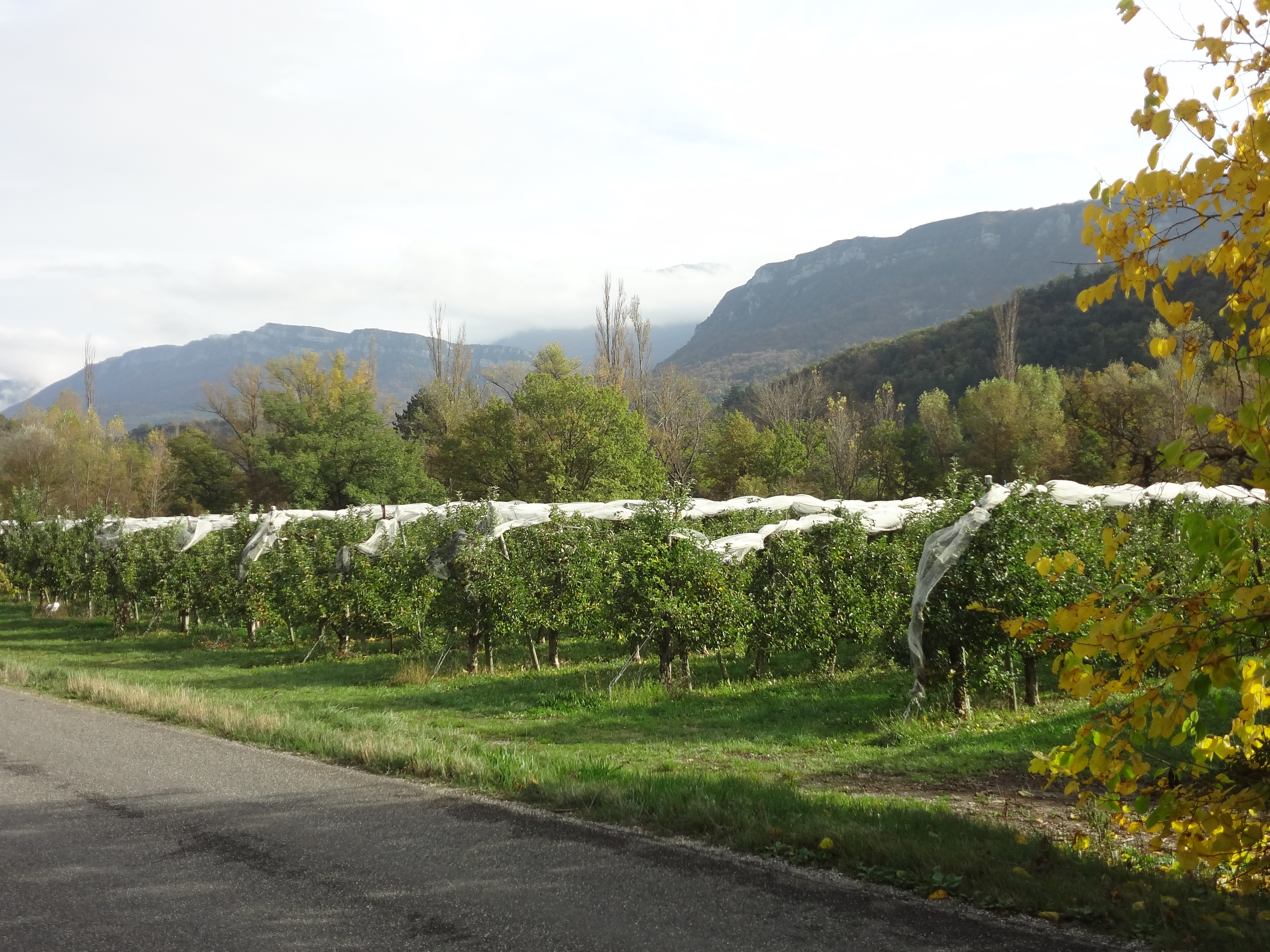 Rangs d’arbres fruitiers et voiles de protection anti-grêle à Saint-Vincent-sur-Jabron